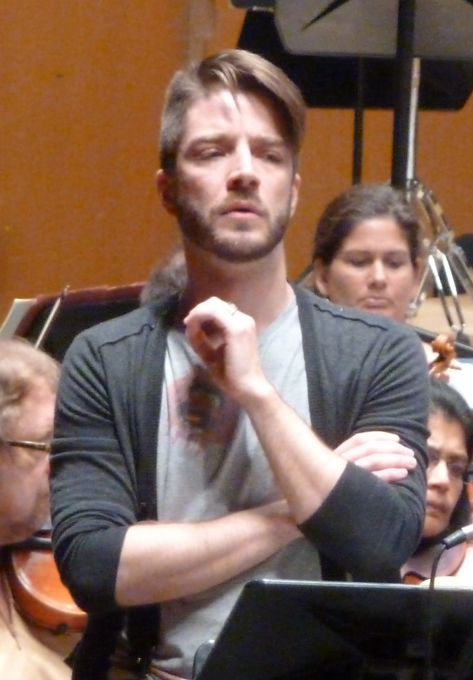 Borja Quiza no ensaio da ópera Tristán e Isolda no Palacio da ópera da Coruña.